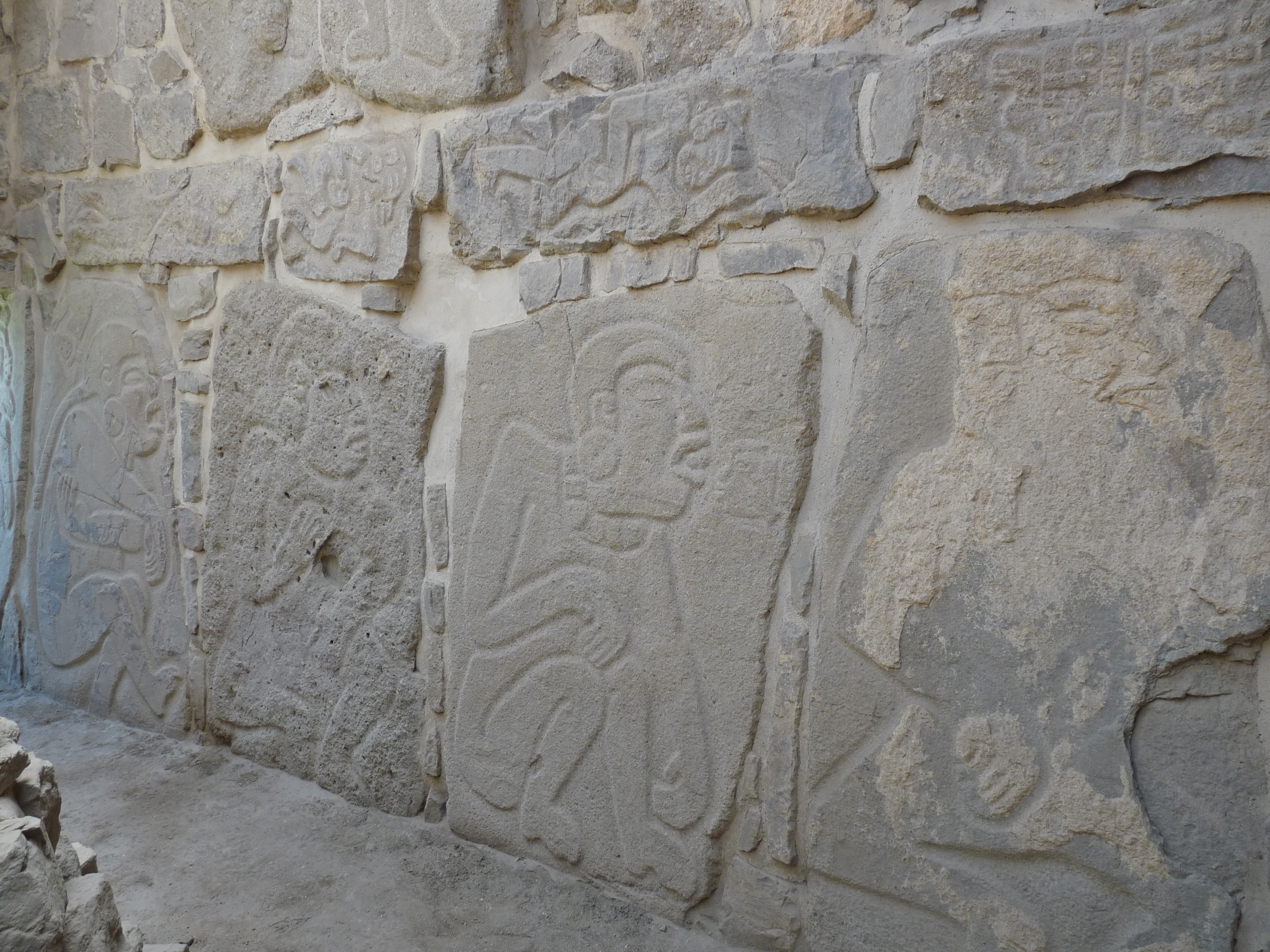 Galería de los Danzantes, sitio arqueológico de Monte Albán.